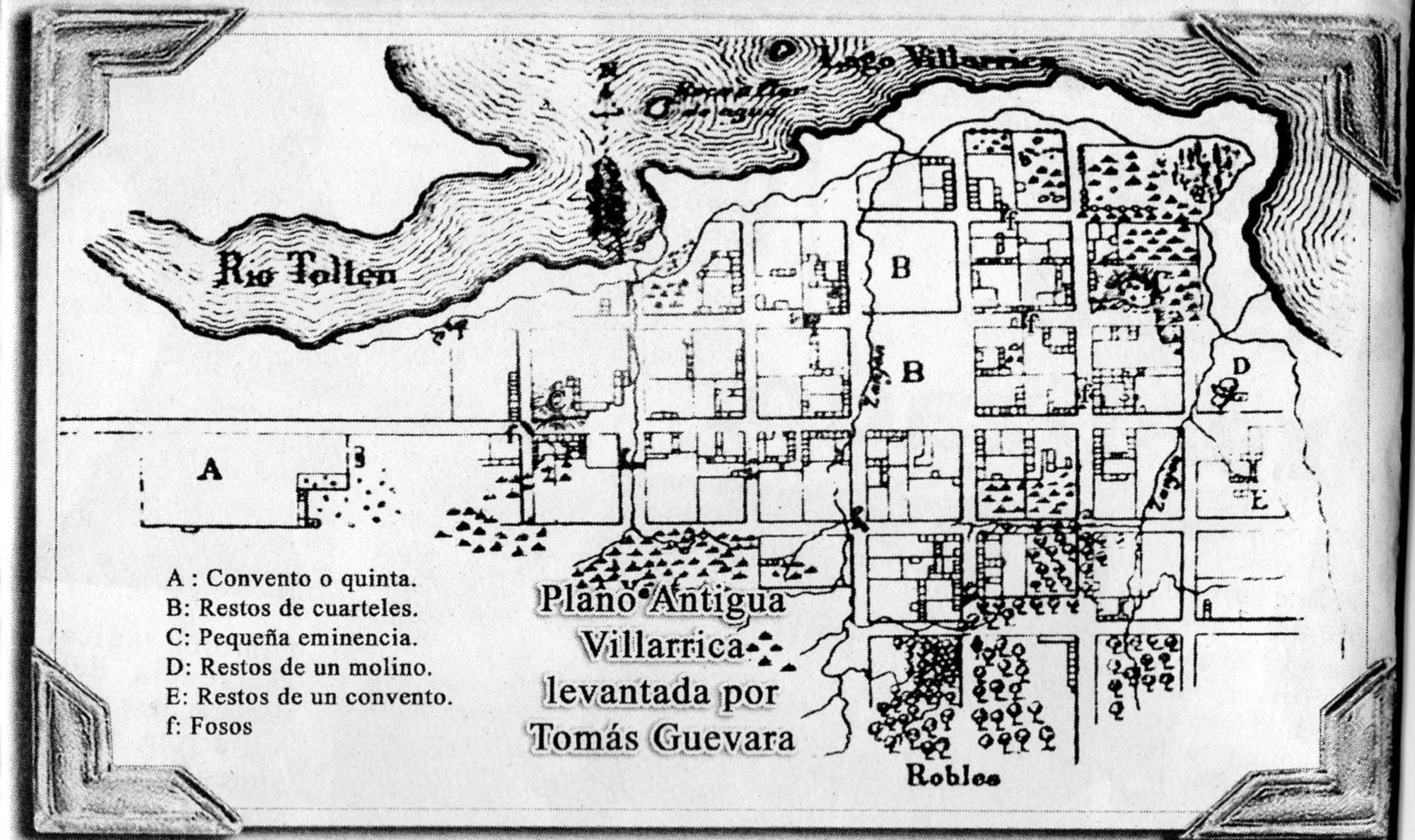 Mapa Antiguo de Villarrica